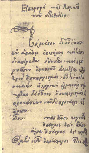 Χειρόγραφο του Μεθοδίου Ανθρακίτη από τη Συλλογή του Γεωργίου Ζαβίρα.